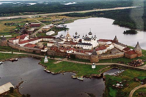 АРХАНГЕЛЬСКАЯ ОБЛАСТЬ, СОЛОВЕЦКИЕ ОСТРОВА. Вид на Соловецкий монастырь.